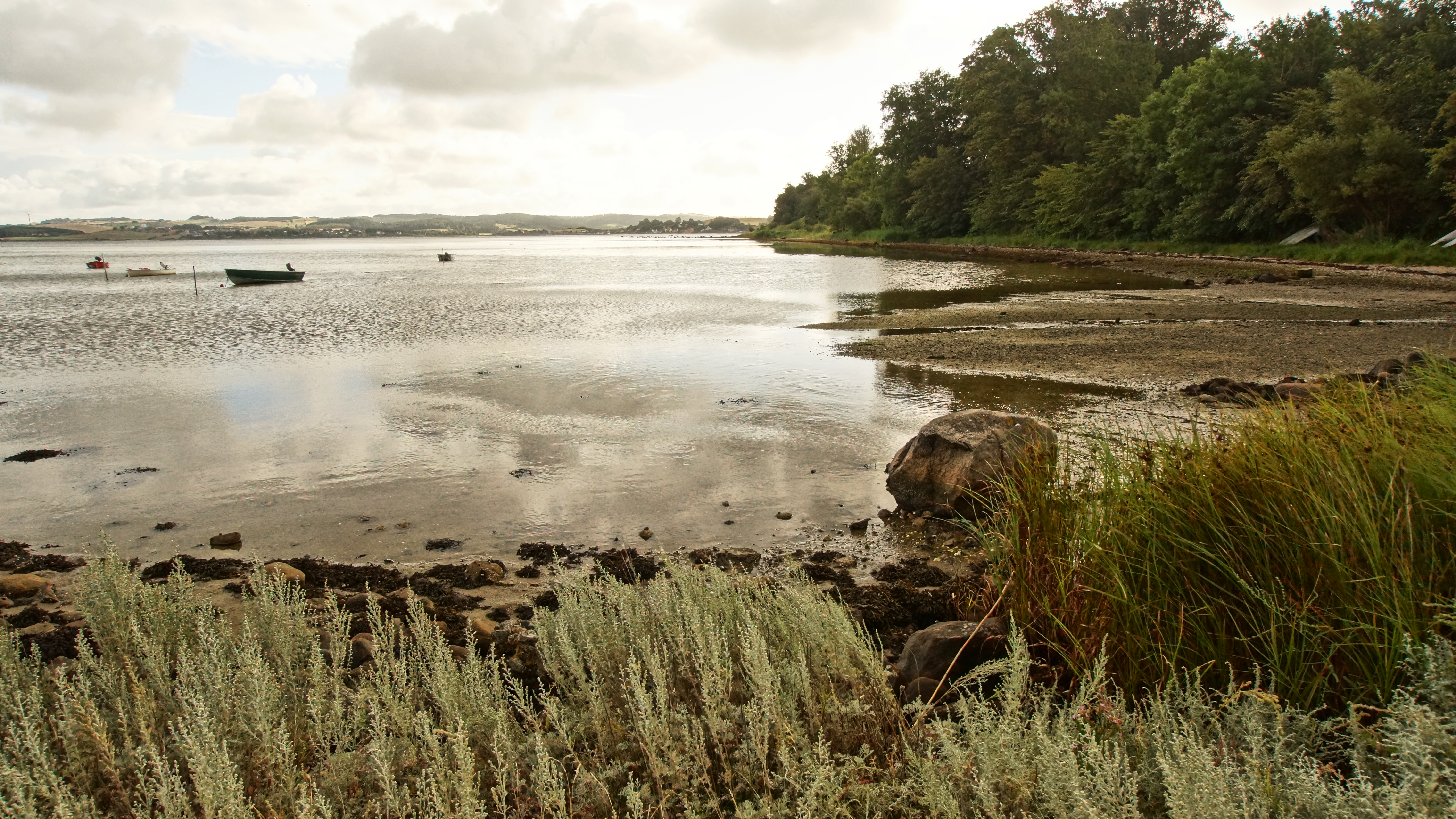 Tved Kær, udsigt over Knebel Vig, sydlige Djursland, ned for Tved Kirke ved bækudløbet.